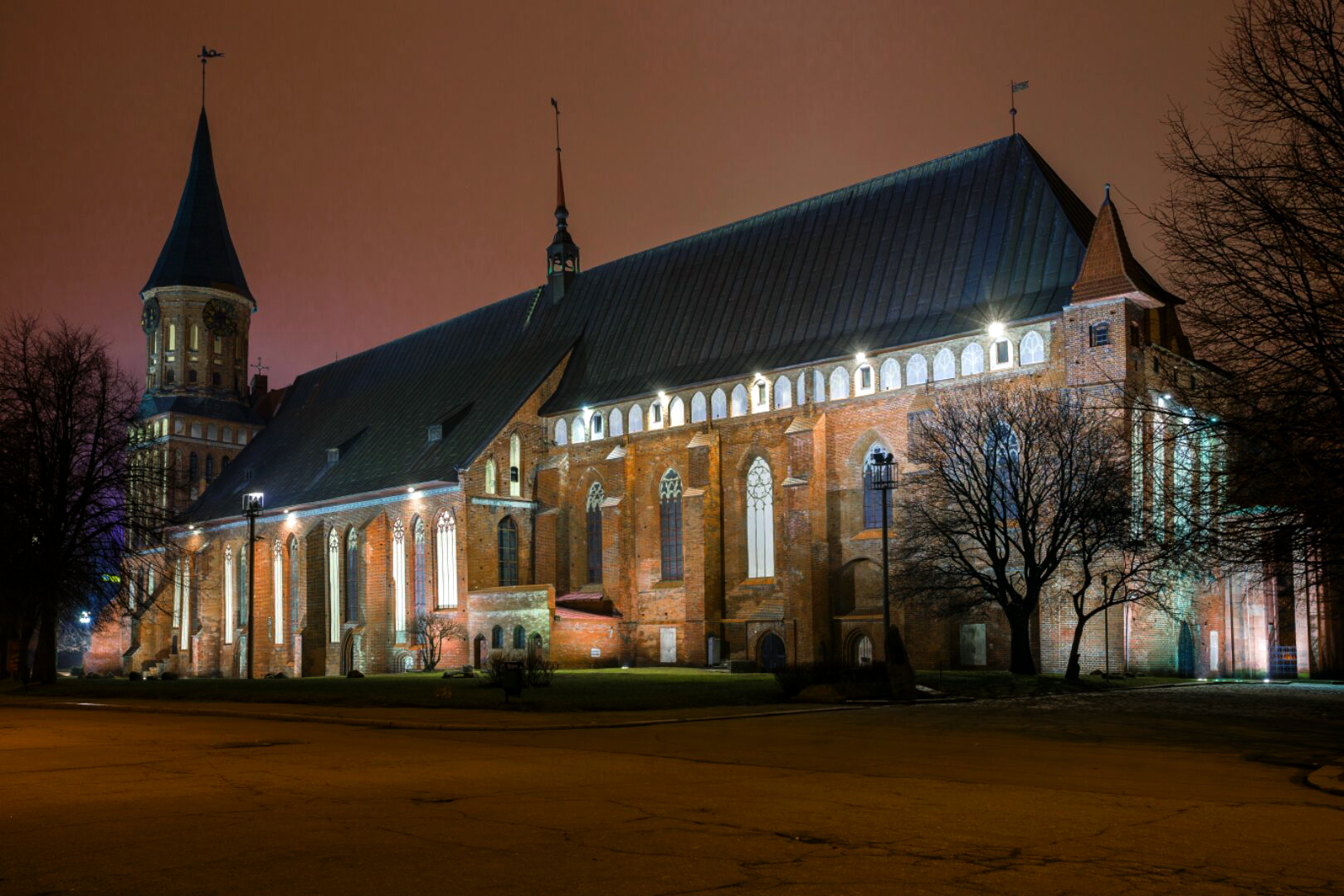 Кафедральный собор: остров Канта, Калининград, Калининградская область